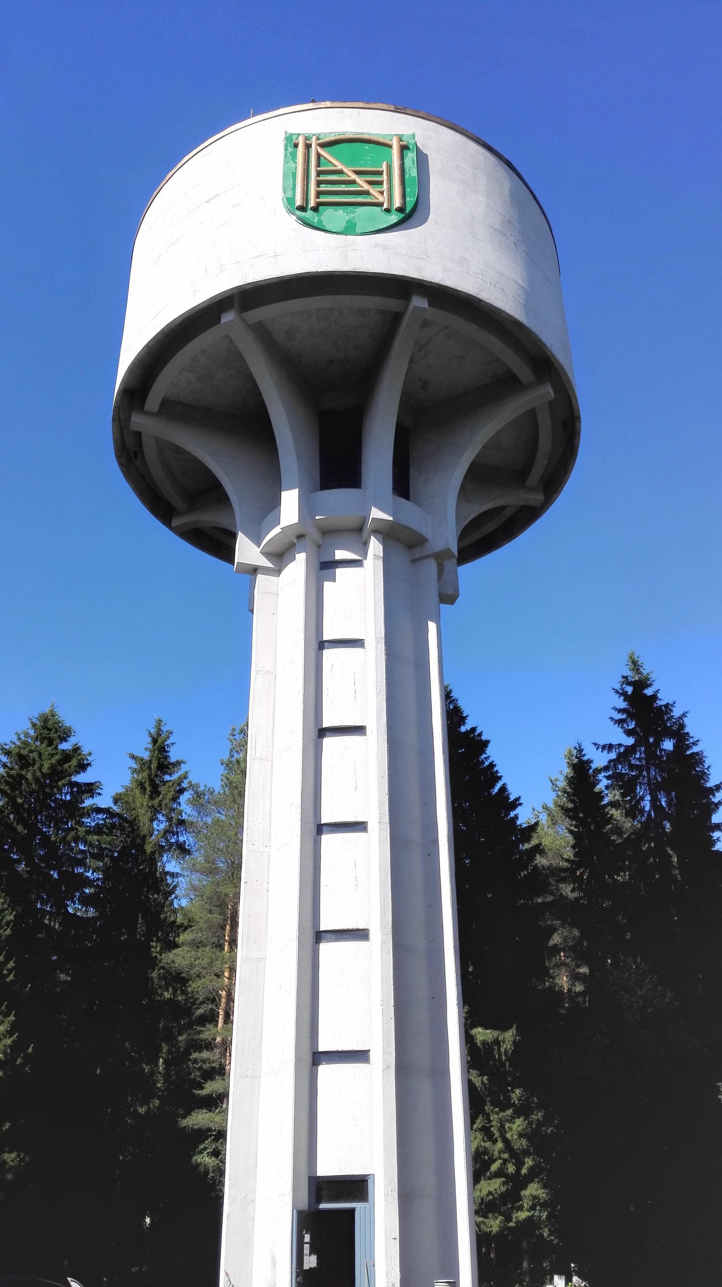 Nivalan vesitorni heinäkuussa 2017.